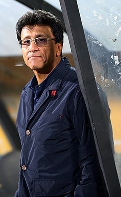 دیدار تیم‌های فوتبال استقلال و صبا - جام حذفی